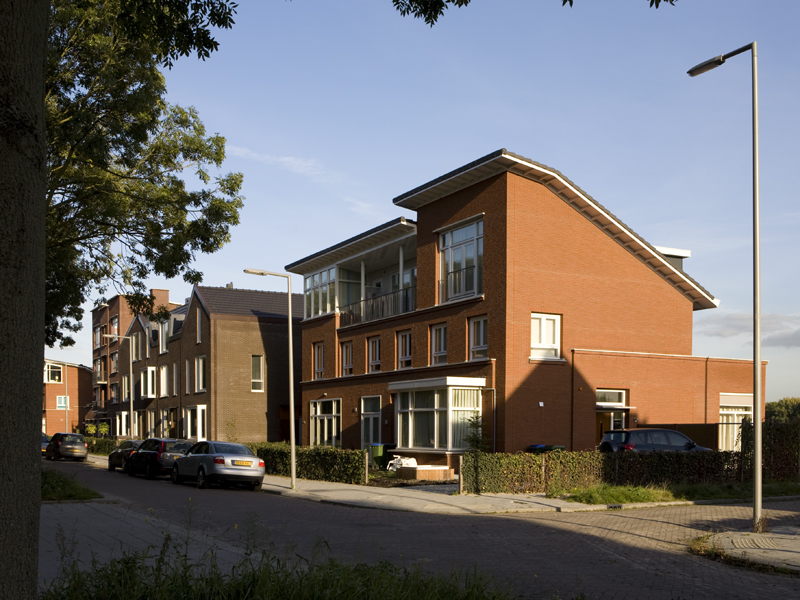 Laanvilla's, Zestienhoven